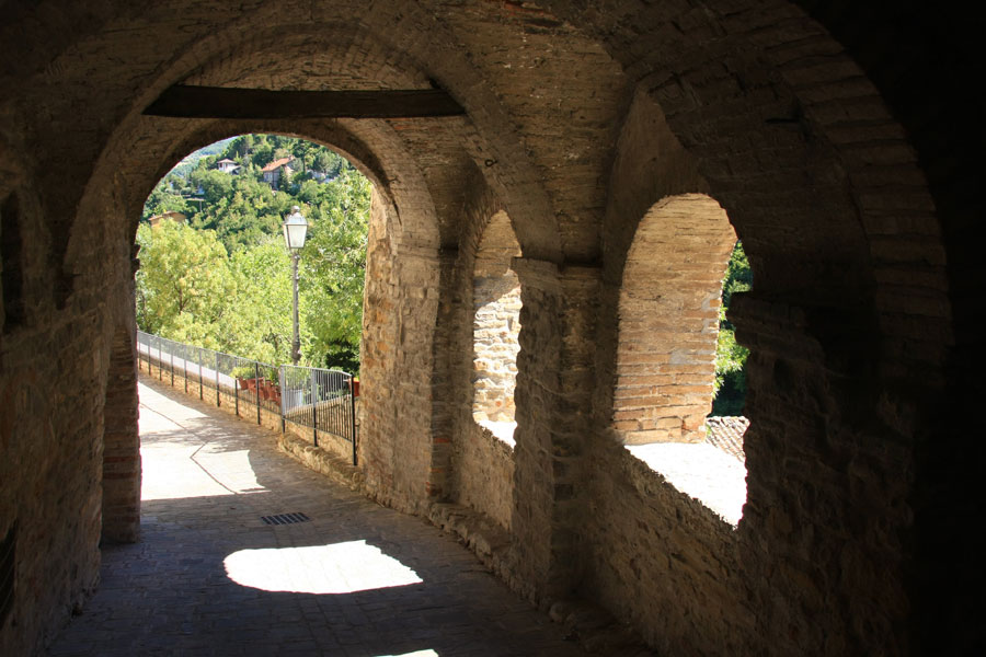 Veduta di una delle caratteristiche "Copertelle", passaggi coperti che corrono lungo le mura, di Serra San Quirico (AN)